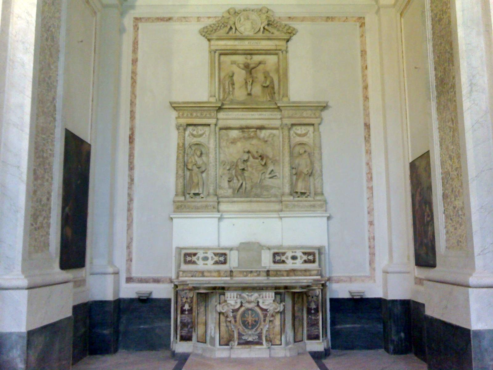 Chiesa di San Giovanni Maggiore di Napoli - Cappella Ravaschieri